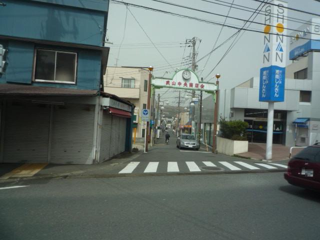 武山中央商店会入り口の画像